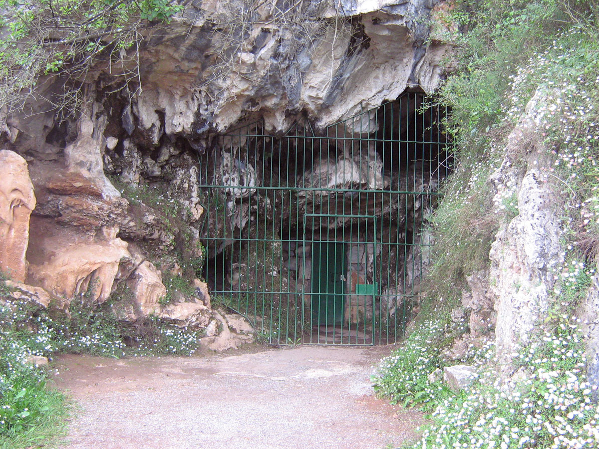 Acceso a la Cueva de las Monedas, perteneciente al complejo de cuevas del Monte Castillo, situado en Puente Viesgo (Cantabria).